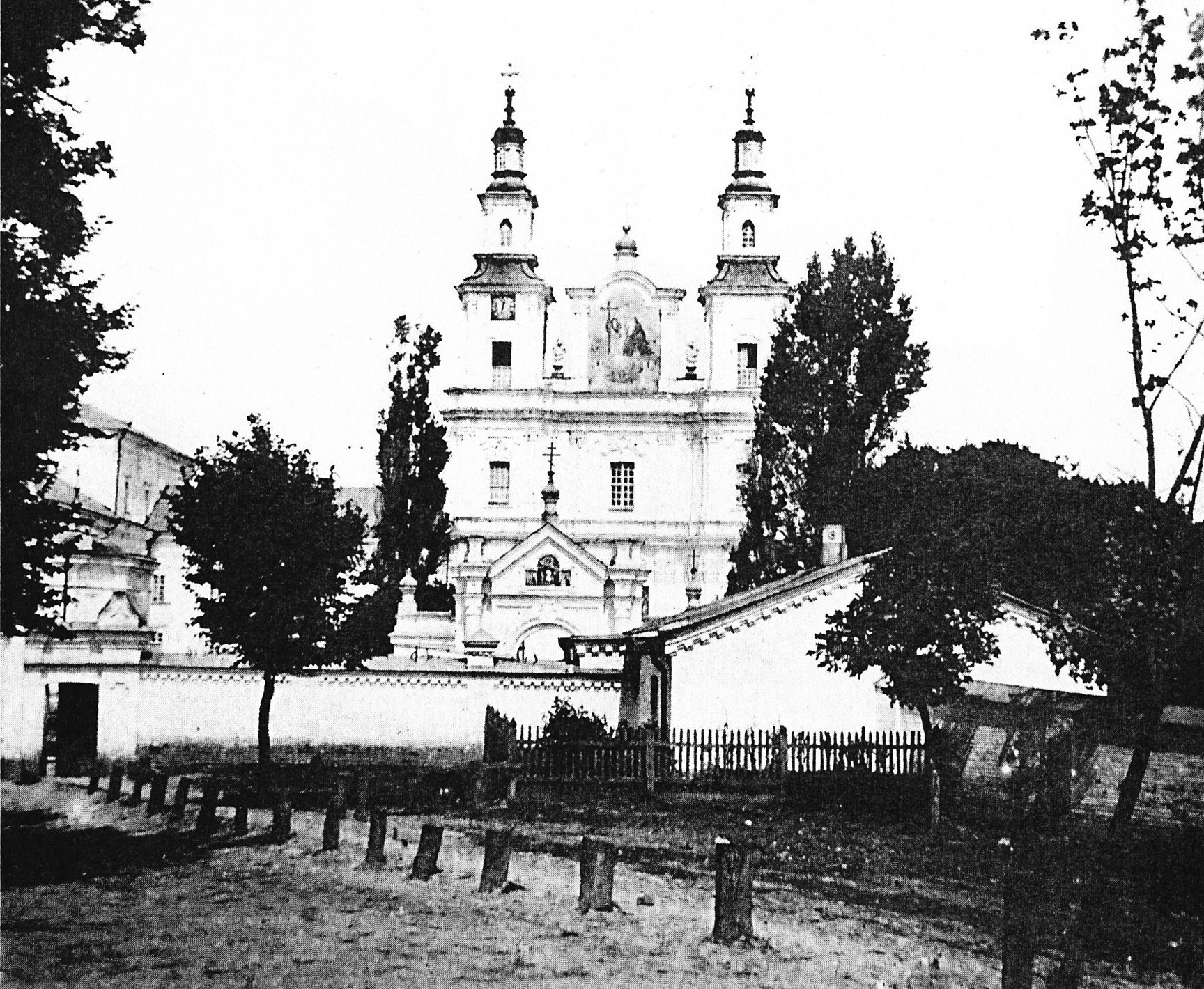 Колишній костел Пресвятої Діви Марії монастиря ордену отців кармелітів взутих від головного фасаду. Село Городище Заславського повіту Волинської губернії.